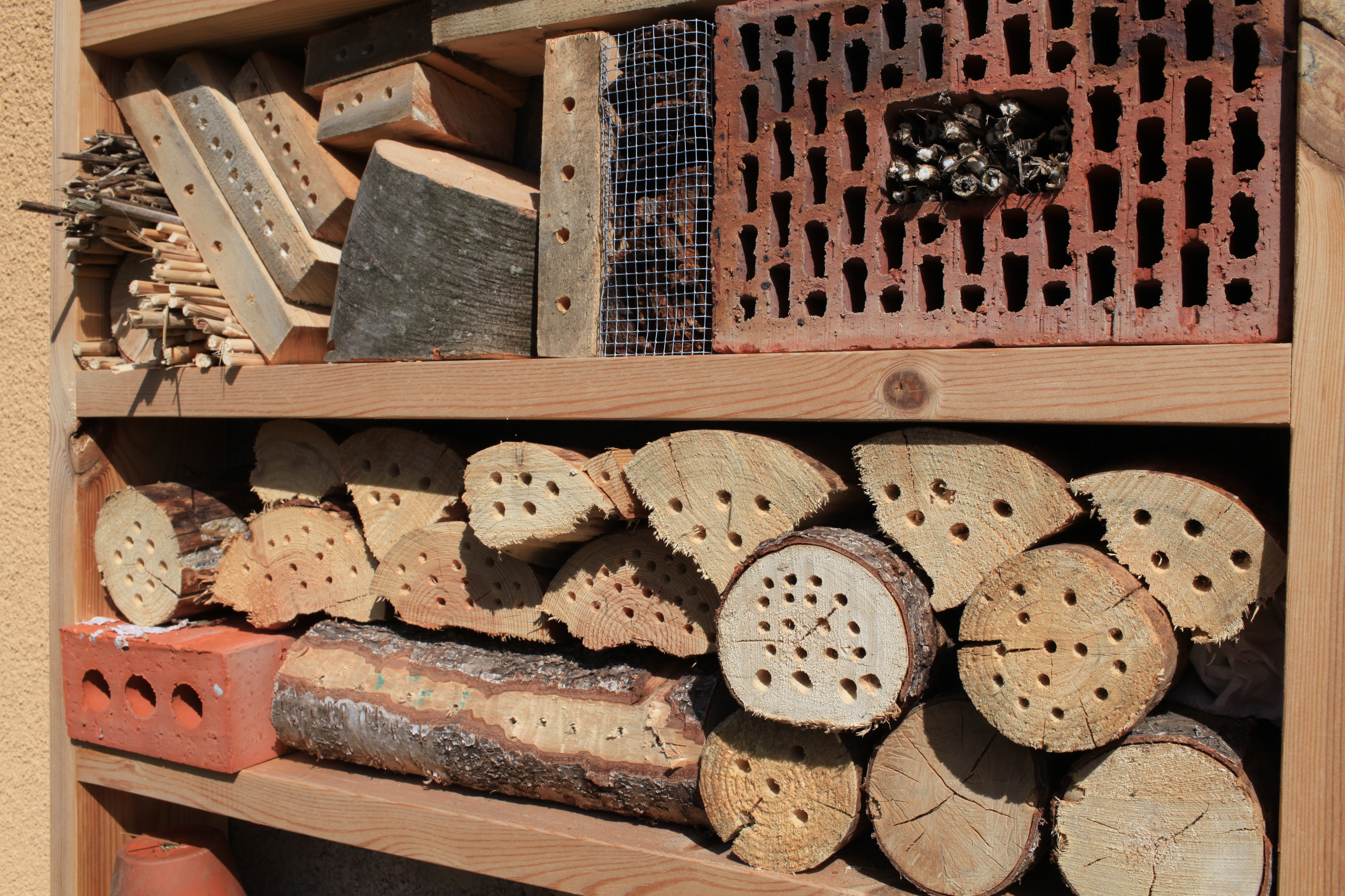 I did an insect hotel to replace an old door that is not used anymore. The insect is oriented towards the south. After 3 days, I got already 4 bombus lapidarius using the hotel. A lot of insects are underestimated regarding their capacity of pollination. As an example, various bombus are much more efficient to pollinate than the non-wild bees like the apis mellifera. J'ai fait un hôtel à insectes avec du matériel de récupération pour remplacer l'espace d'une vielle porte. L'hôtel est orienté vers le sud. Après 3 jours, j'avais déjà 4 bombus lapidarius qui occupent l'hotel. Beaucoup d'insectes sont sous-estimés pour leur capacités de pollinisation. On parle souvent de l'abeille domestique mais les espèces sauvage pollinisent plusieurs espèces que les abeilles ne peuvent pas pollinisé. Une bonne raison pour les accueillir...